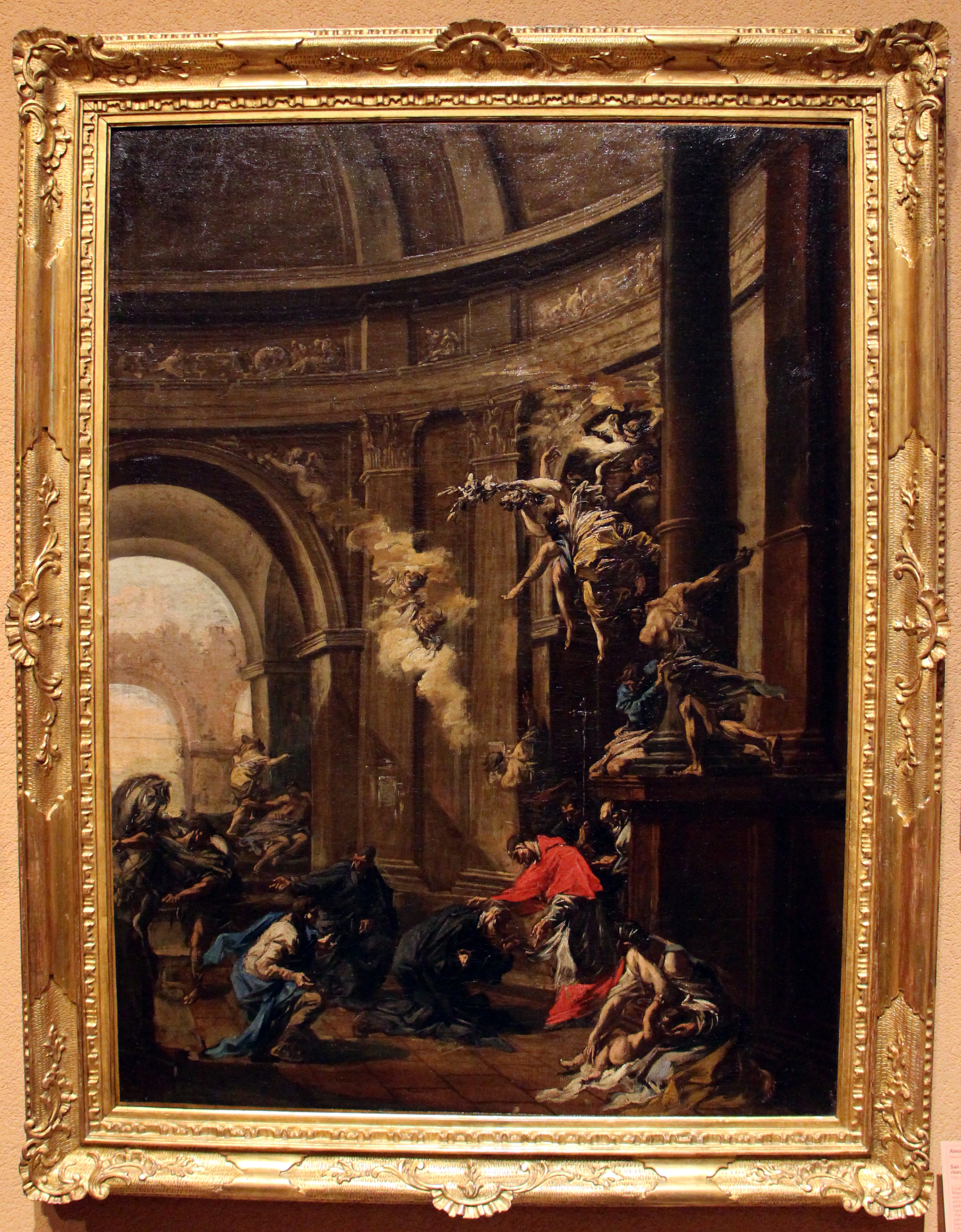 Museo Poldi Pezzoli (Milano)